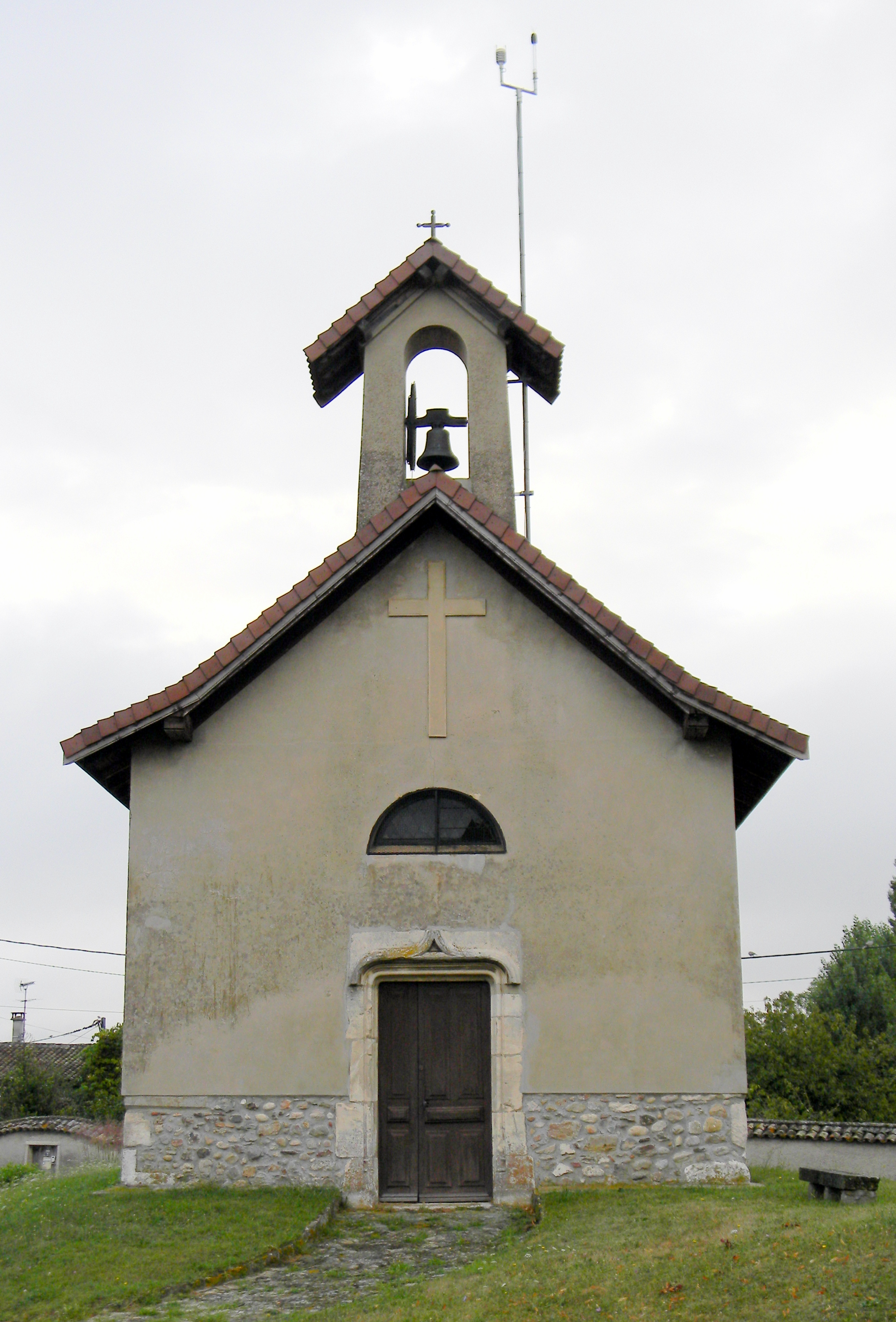 Chapelle Saint-Ours à Janneyrias.